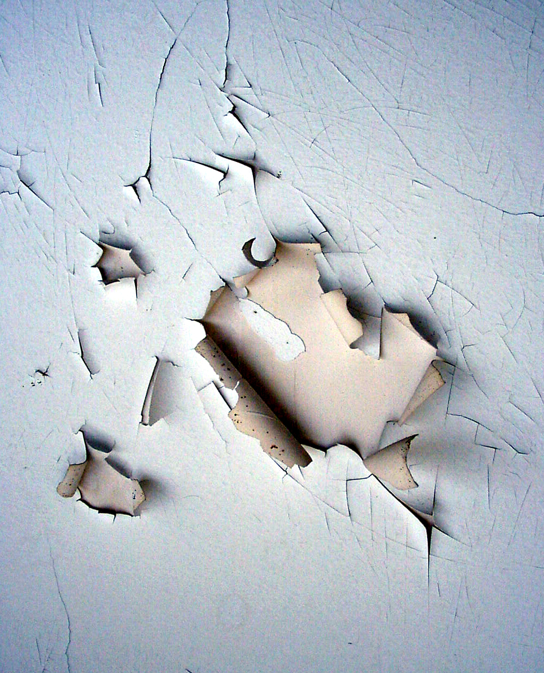 peinture au plomb (céruse de plomb) écaillée, dans une maison datant d'avant 1948